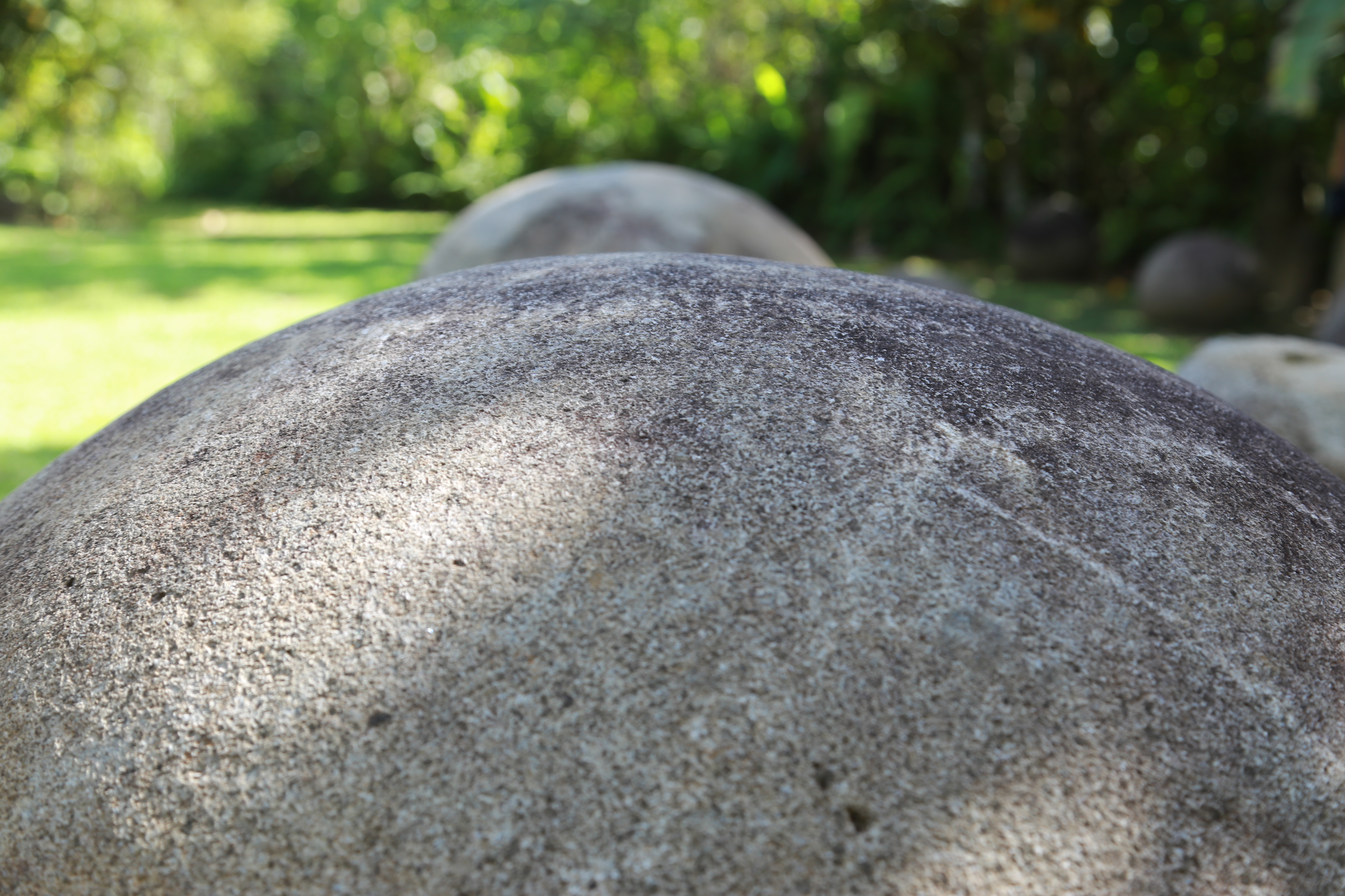 Diquis Stone spheres